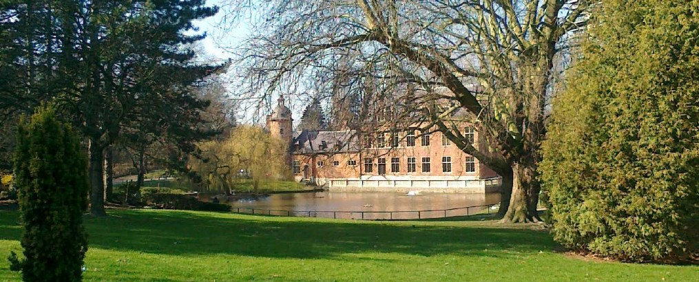 Château à Molenbeek Saint Jean (Bruxelles) qui acceuille chaque année le Festival Bruxellons!